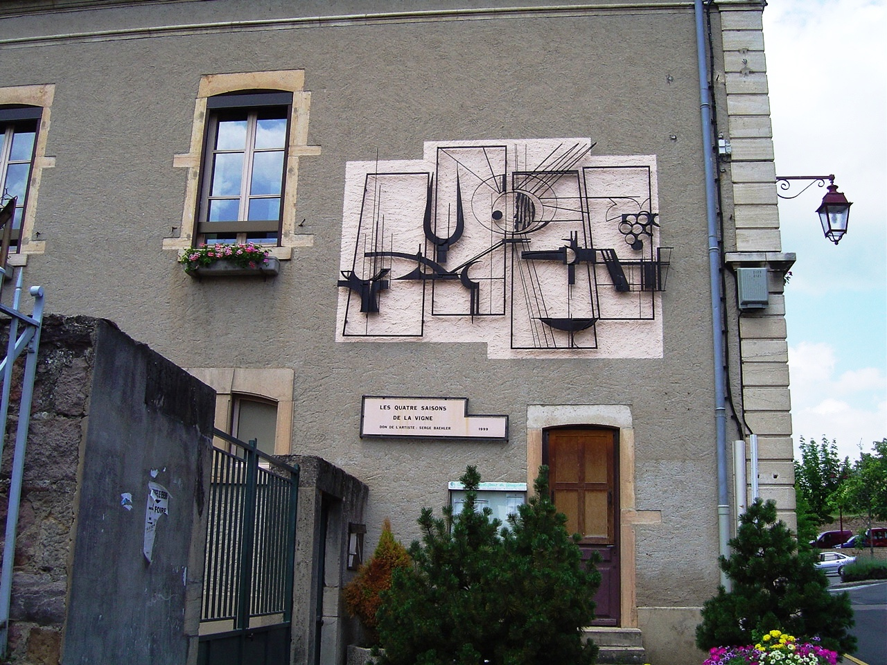 Schmiedeeisernes Wandrelief in Juliénas: Les quatre Saisons de la Vigne. Gestiftet vom Künstler Serge Baemler im Jahre 1999 Fotografiert von User:Ile-de-re am 28.06.2006